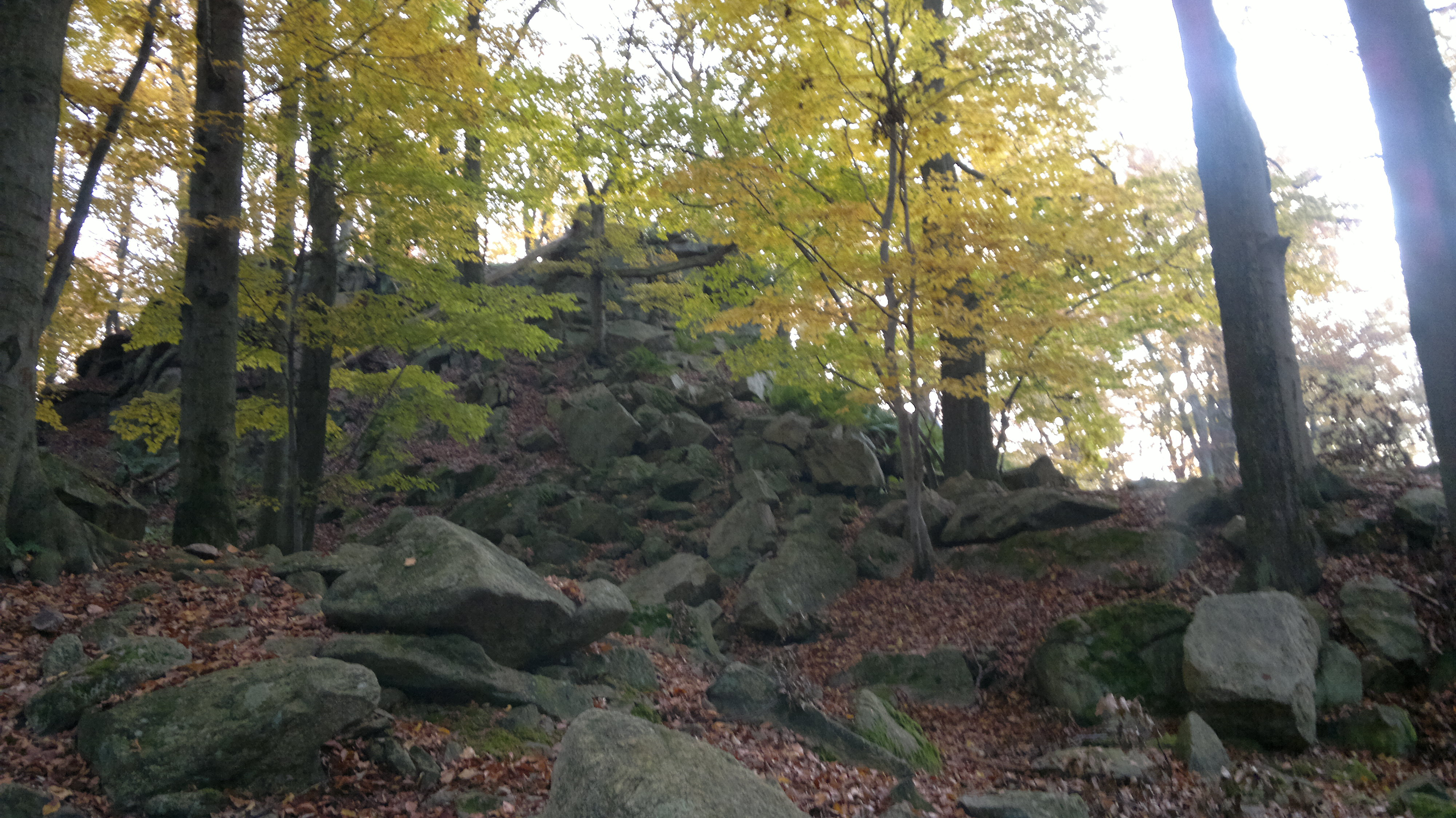 Obnažená blanická ortorula na vrcholu Malého Blaníku